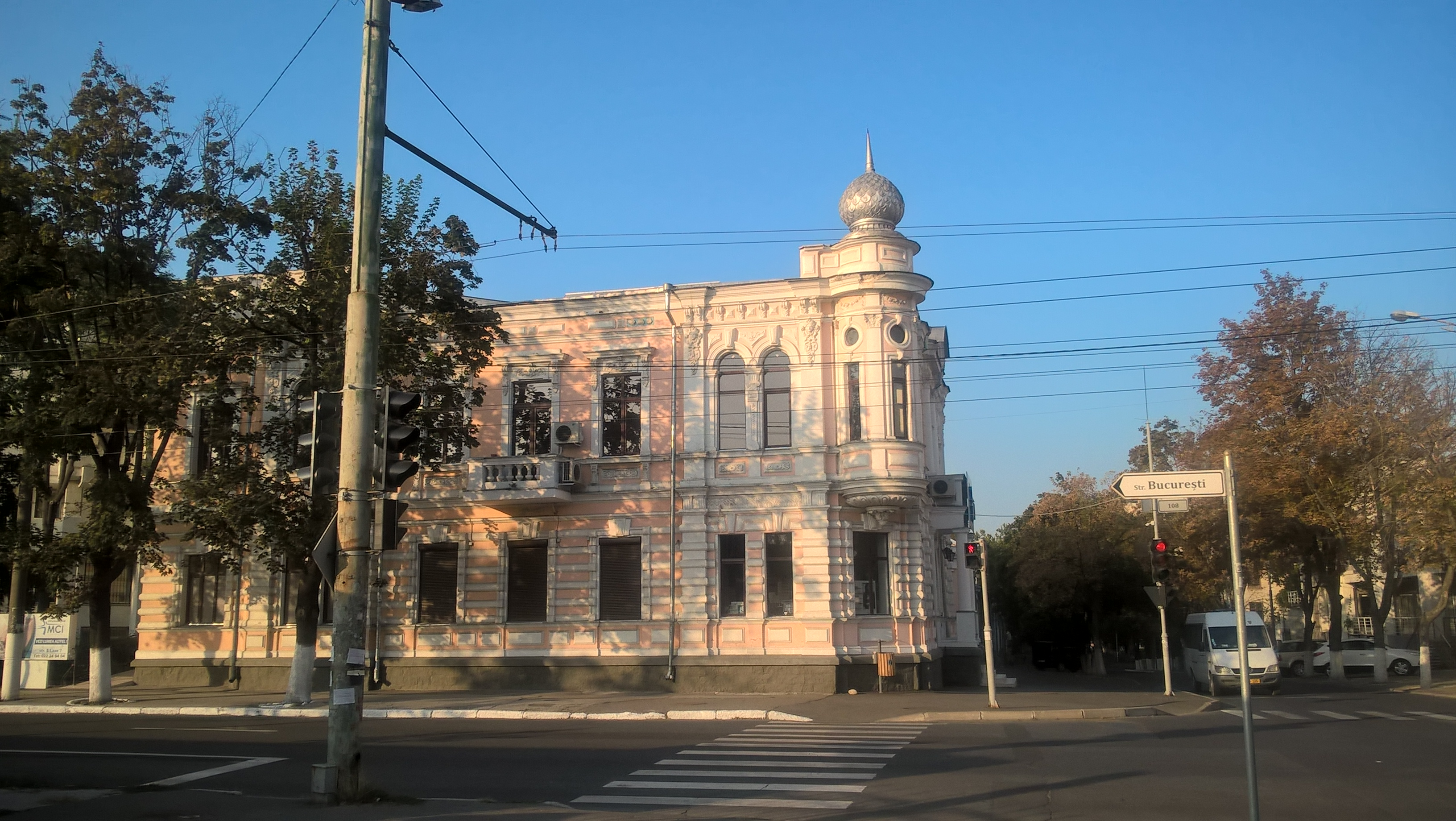 Willa A. Mimiego przy ul. Bucuresti w Kiszyniowie